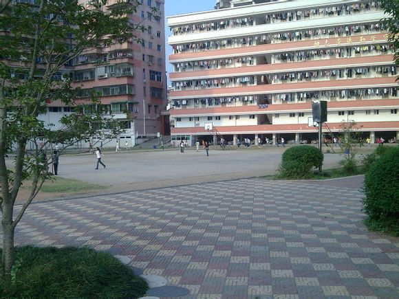 中文（中国大陆）: 建阳二中桃李苑